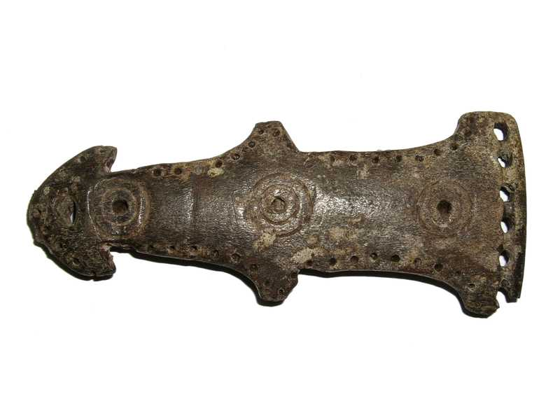 Fermaglio di schema antropomorfo. Un'estremità è caratterizzata da 6 forellini passanti del tipo cilindrico. L'altra presenta un solo foro passante del tipo a "clessidra". I margini sono decorati da una fila di puntini mentre, in corrispondenza dell'asse maggiore, sono presenti tre motivi a bersaglio ottenuti a compasso.